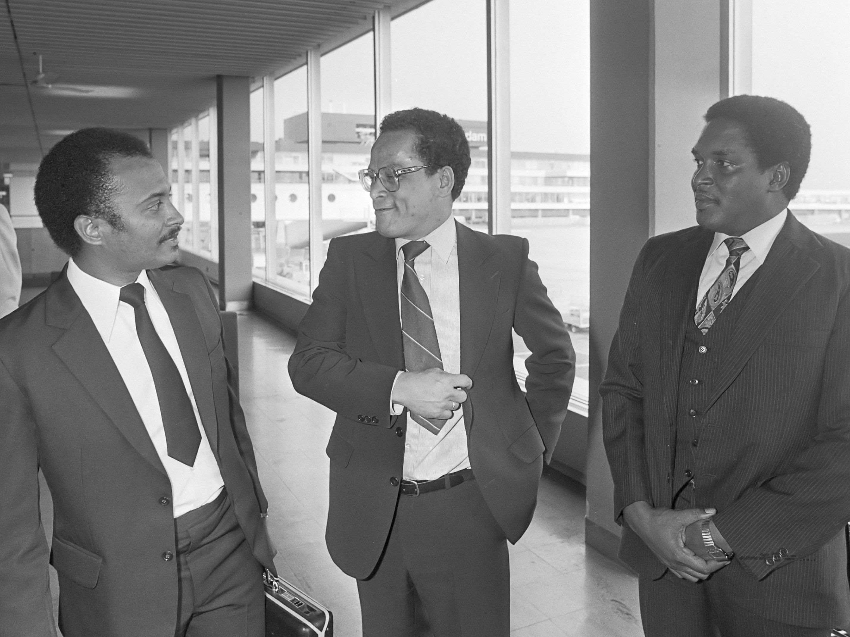 Surinaamse ministers op Schiphol; v.l.n.r. Iwan Graanoogst (voorzitter van de Nationale Militaire Raad), Hans Prade (ambassadeur van Suriname), en Harvey Naarendorp (minister van leger en politie) 2 september 1981